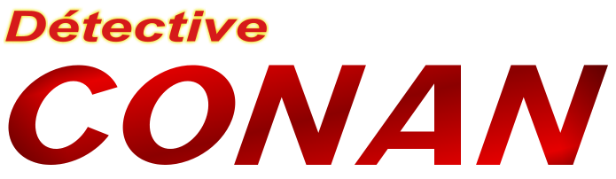 Logo titre du manga AI non-stop!